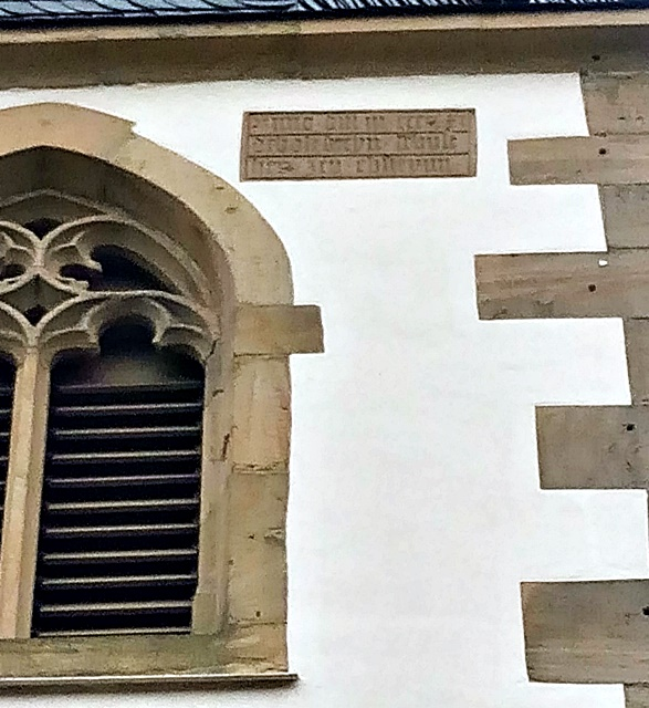 Eppstein St. Cyriakus, Turm, Detail mit Bauinschrift von 1511